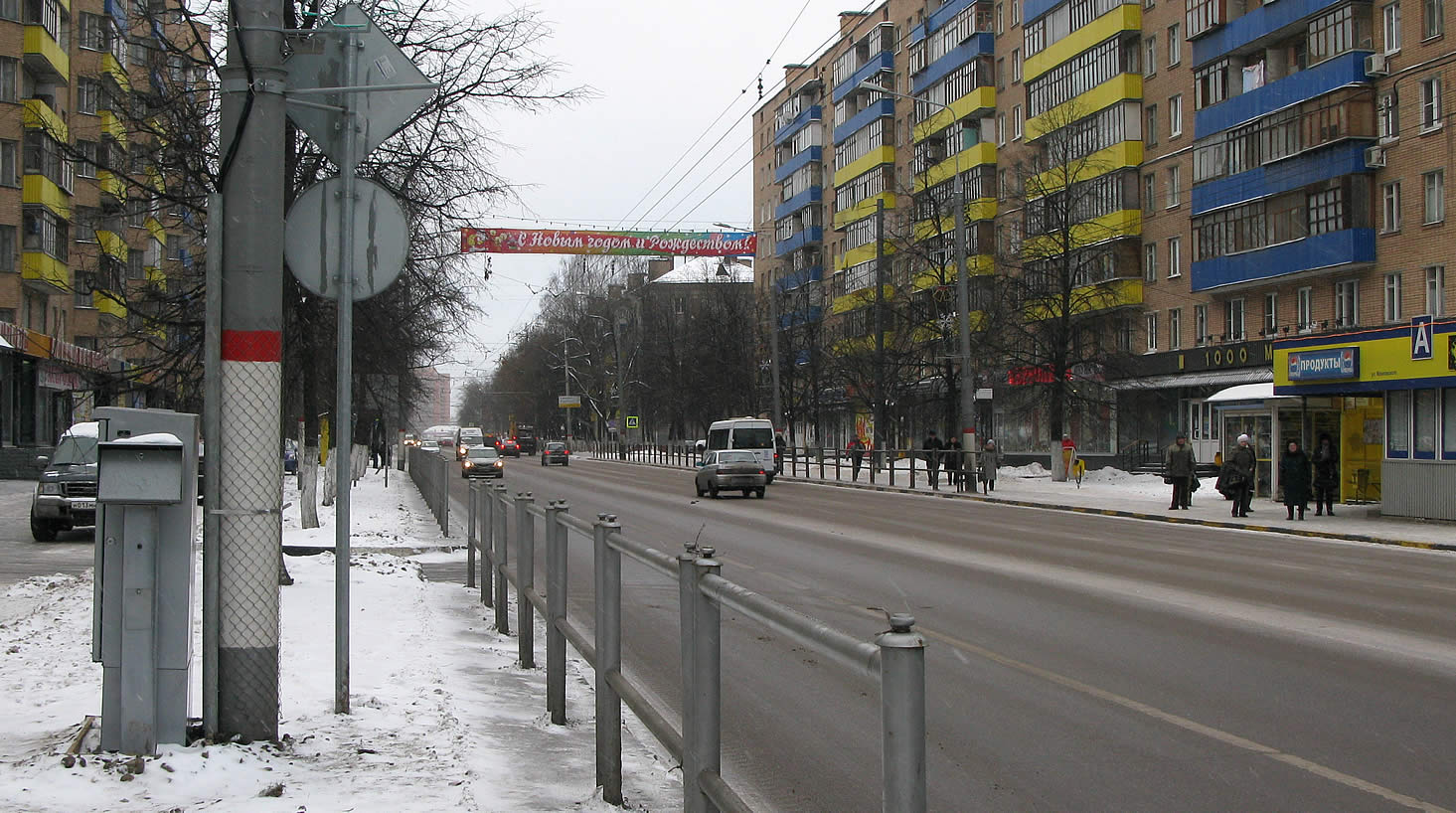 Фото ул. Маяковского, г. Химки, Московская область